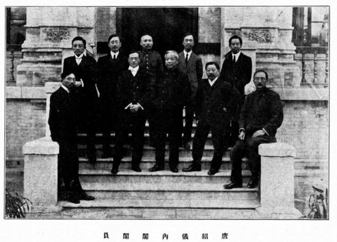 中文（台灣）: 唐紹儀內閣閣員